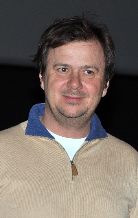 Philippe Godeau à l'avant-première de "11.6"